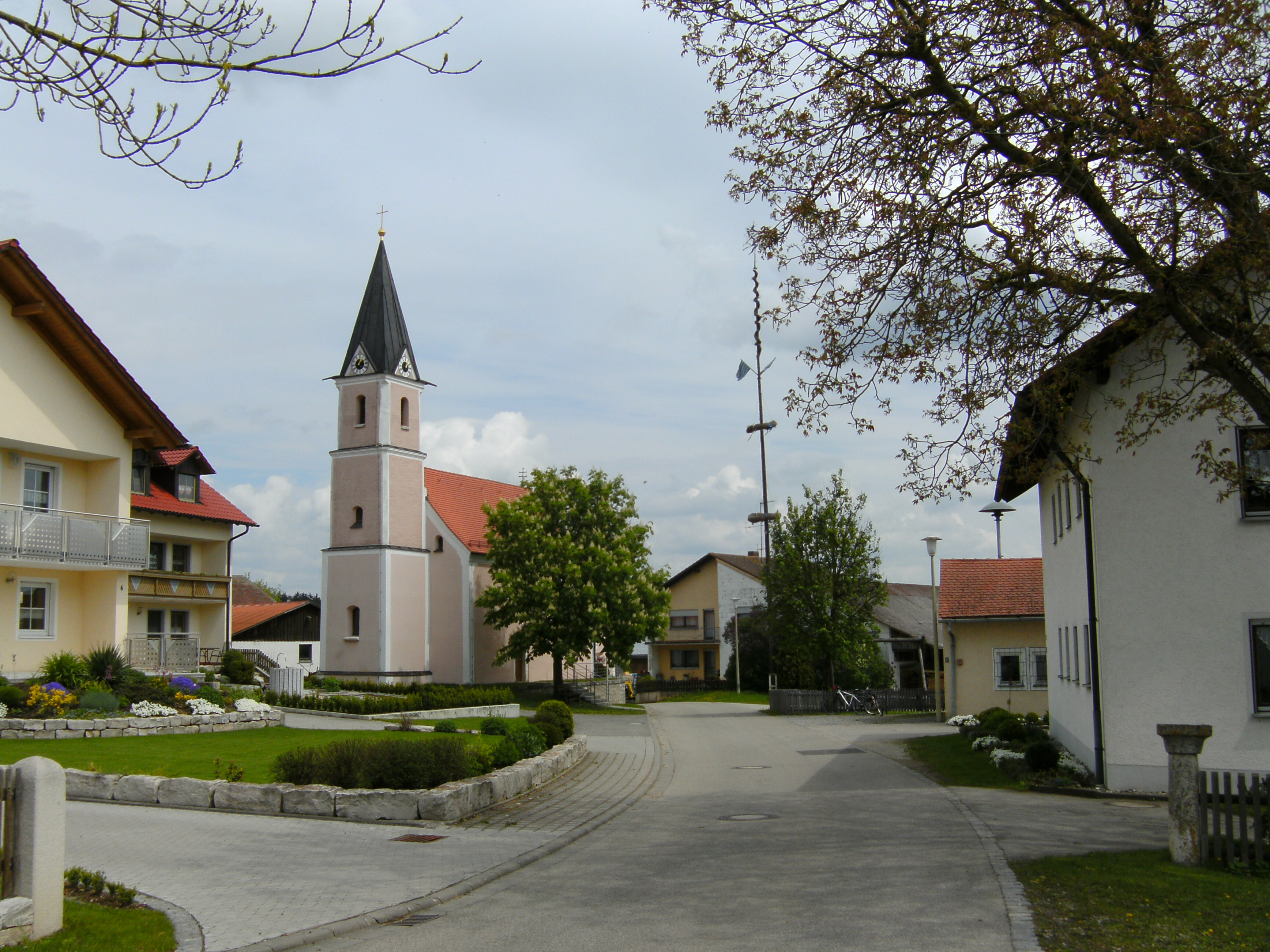 Arnsdorf, Ortsteil von Dietfurt an der Altmühl im Landkreis Neumarkt in der Oberpfalz